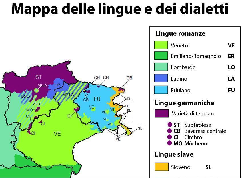 Dettaglio estratto da File:Dialetti parlati in Italia.png caricato da utente WolfRayet il 1 dic. 2012 (v. voce: Lingue Retoromanze)